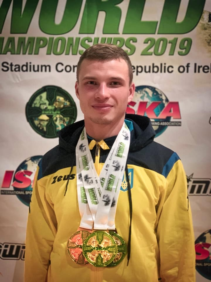 Чемпіон Світу з кікбоксінгу Сотін Володимир